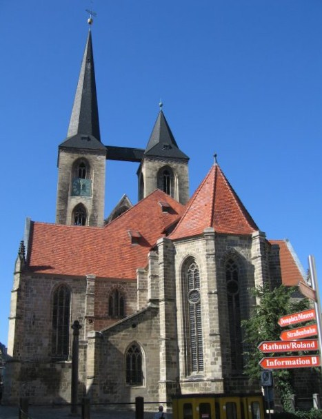 Martinikirche zu Halberstadt, Blick von Osten